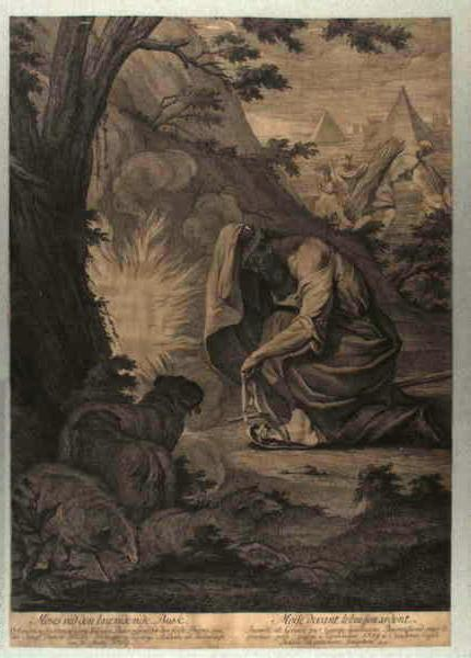 Moses ved den brændende tornebusk. Baurenfeind modtog den store guldmed. ved Kunstakademiet for dette.